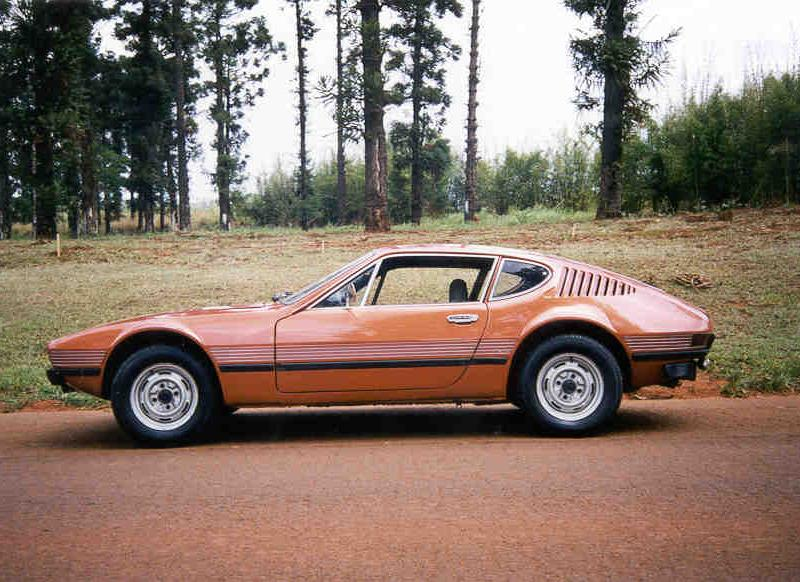 Vista lateral de un Volkswagen SP2